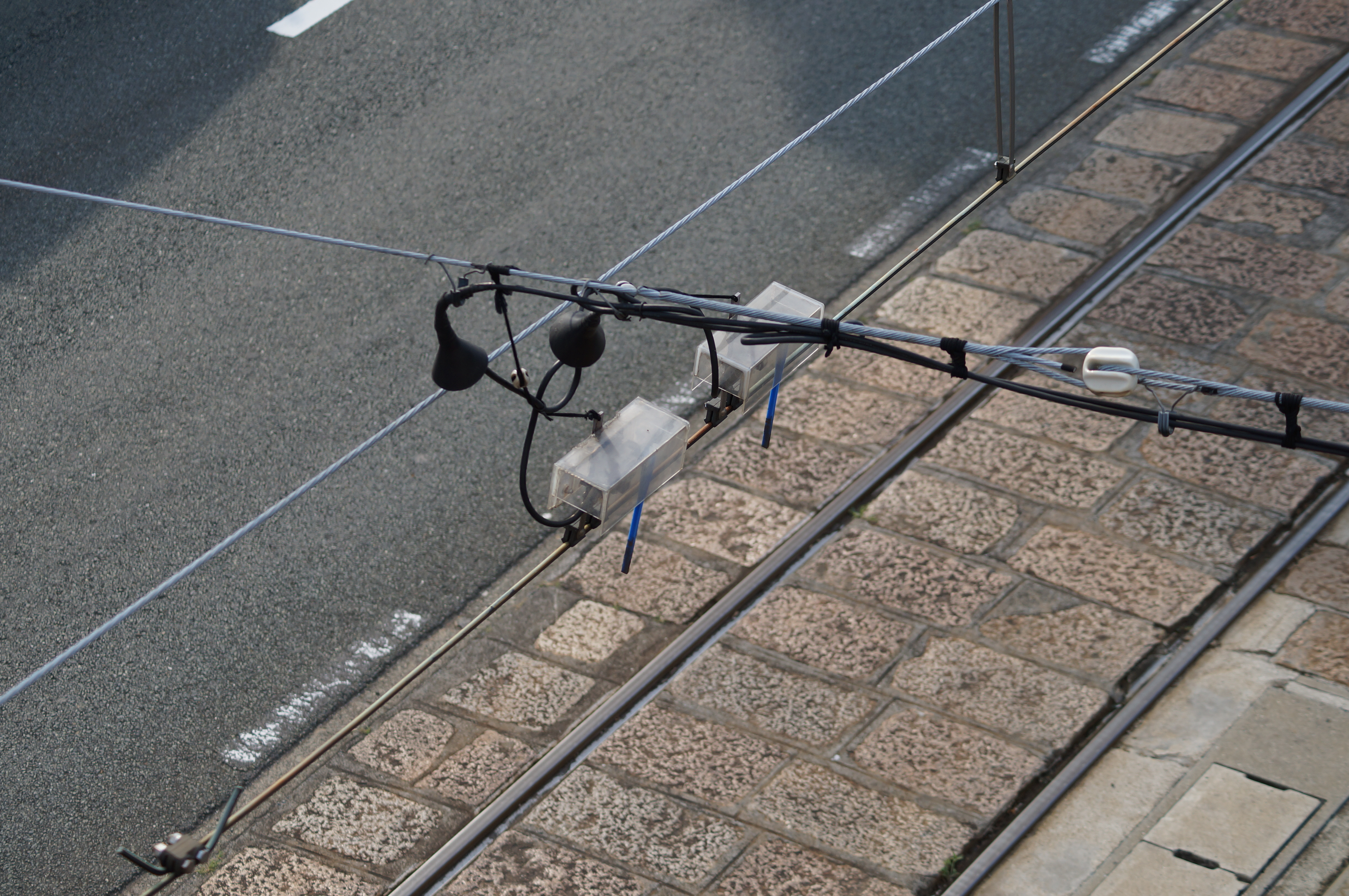 トロリーコンタクター 熊本市電